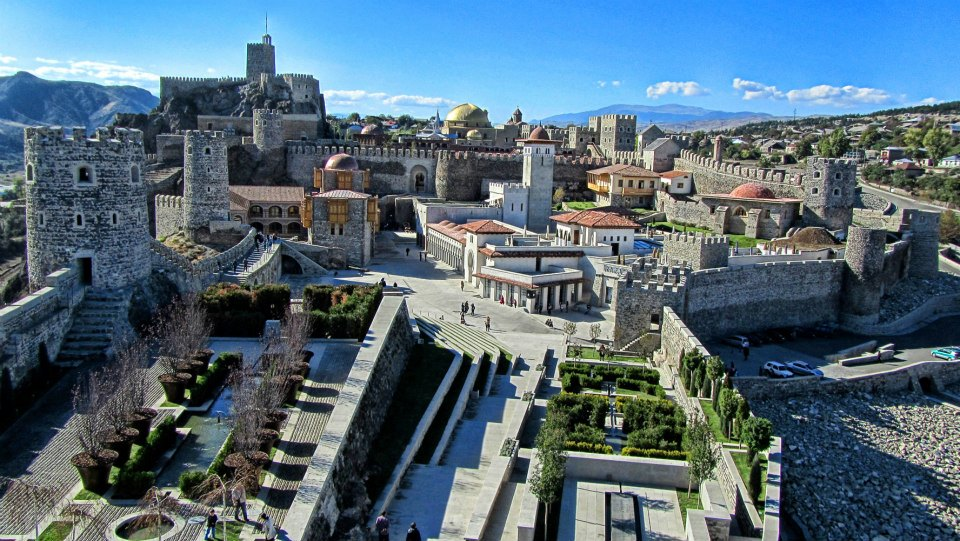 Rekonstruita kastelo de Aĥalciĥo.